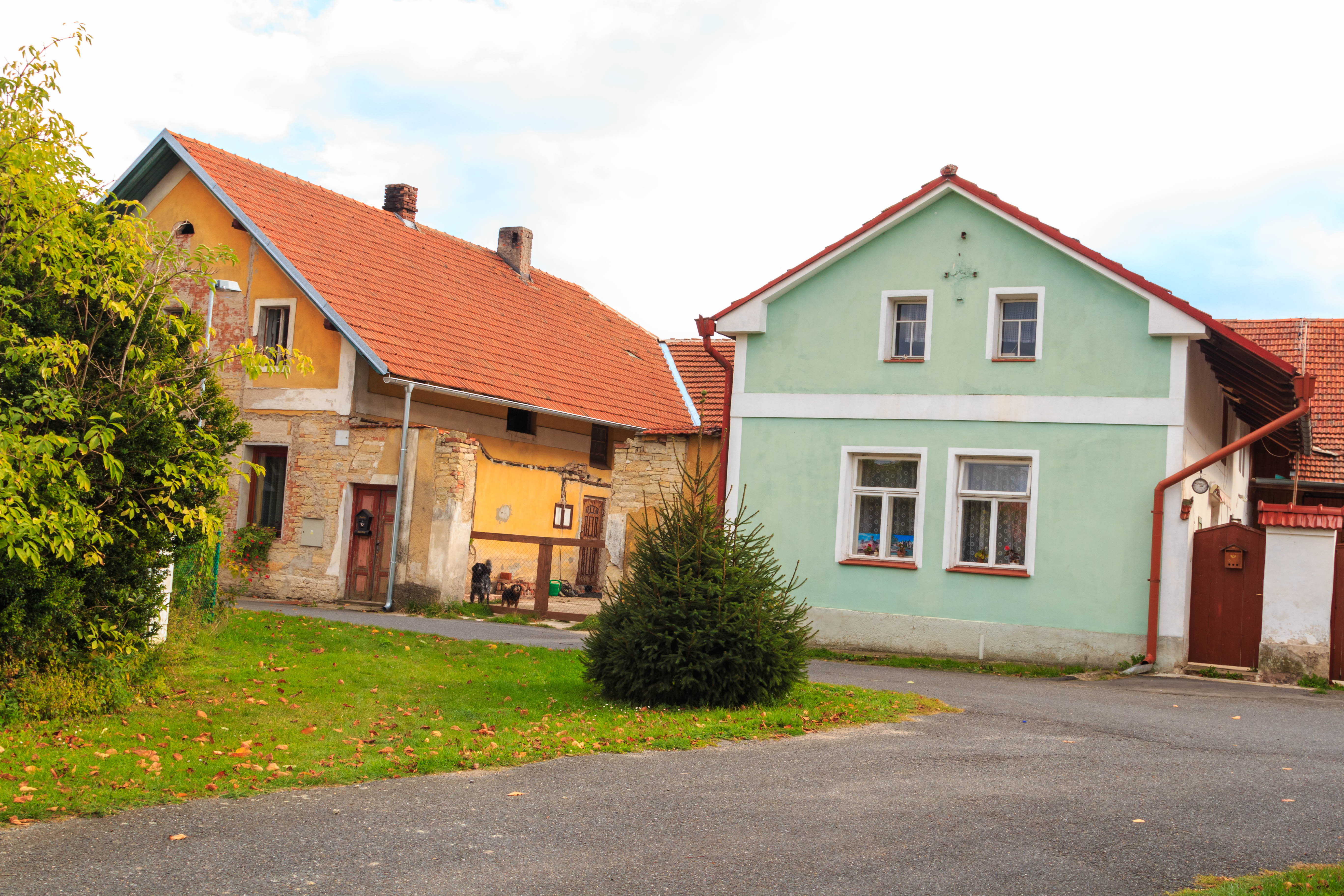 Popovec čp. 10